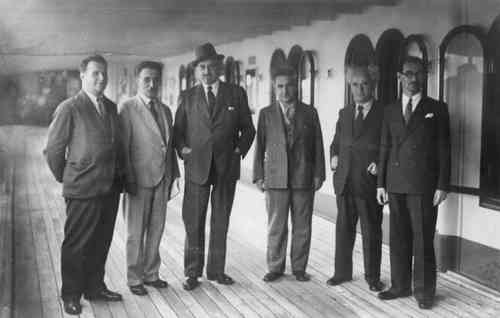 בן גוריון ברל כצנלסון וייצמן משה שרת באניה באלכסנדריה 18-11-1936 11122